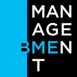 BME Management Szakkollégium logója